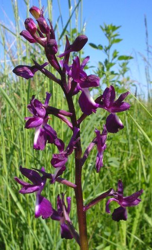 Description: Orchis laxiflora, environs de Galargues (34), mi-mai 2004